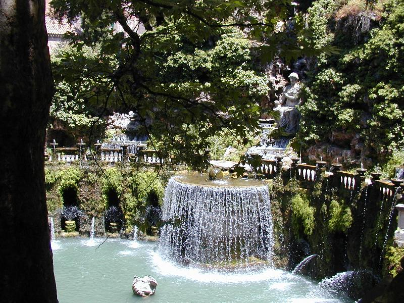 Tivoli, Villa d'Este - fontana dell'Ovato